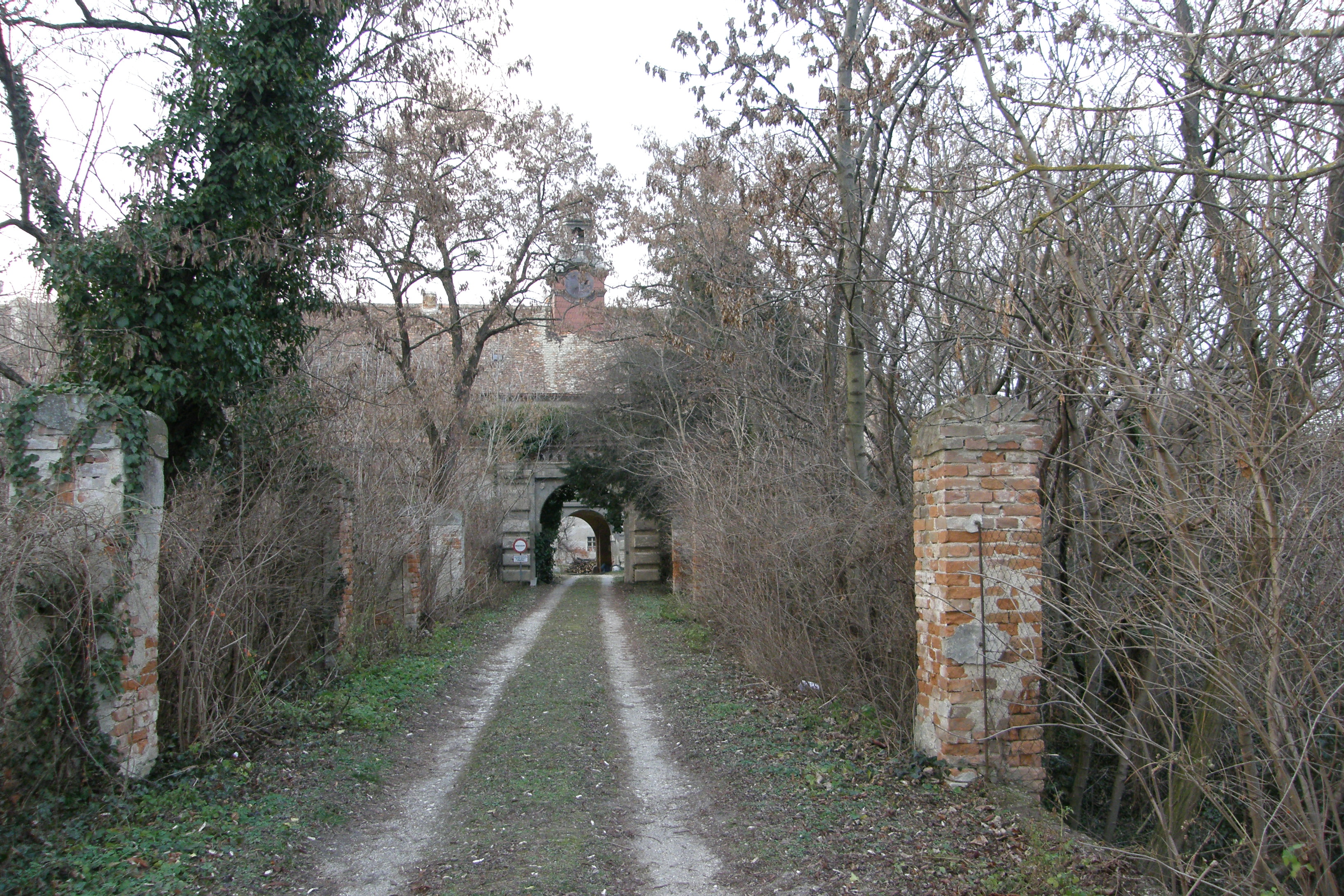 Schloss Rabensburg